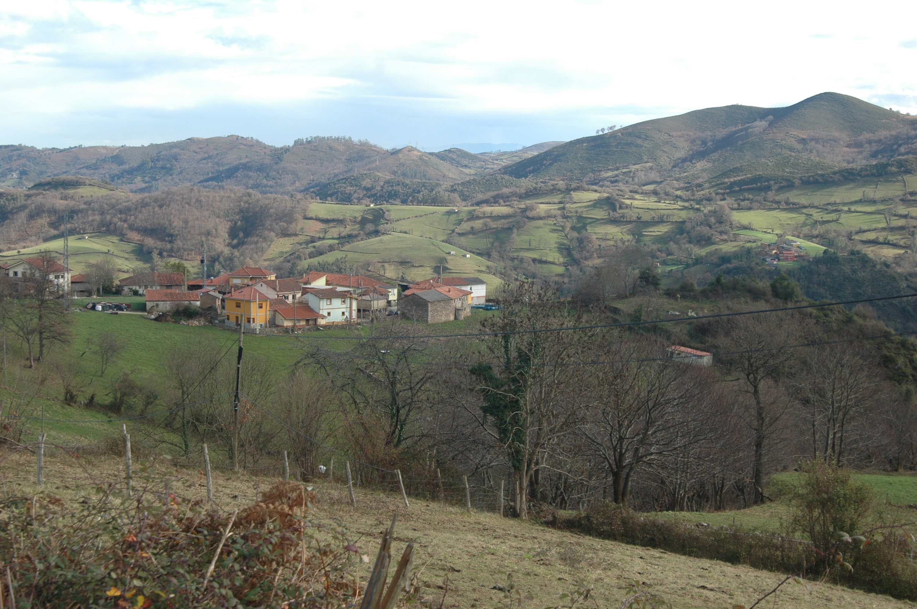 Vista del pueblu de Pando, na parroquia moscona de Rañeces.